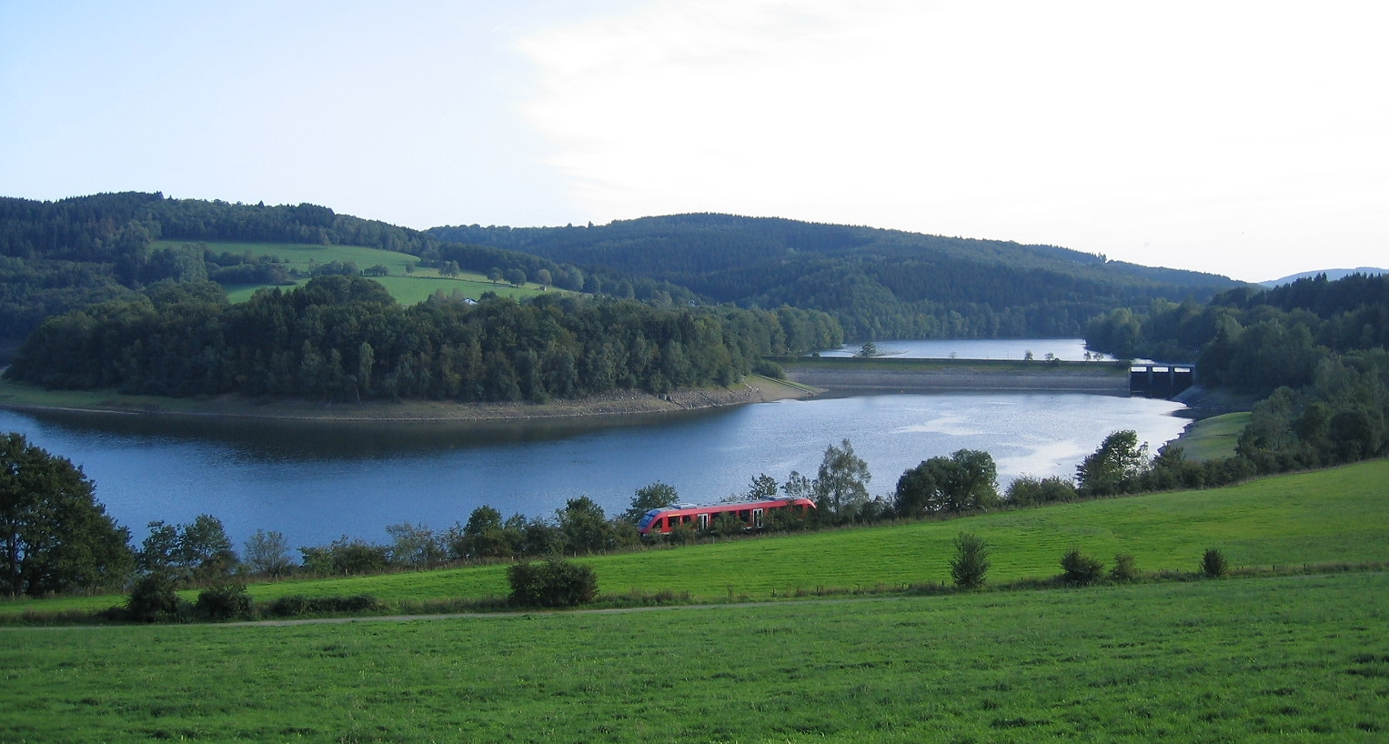 Biggetalsperre zwischen Sondern und Eichhagen mit Biggesee-Express